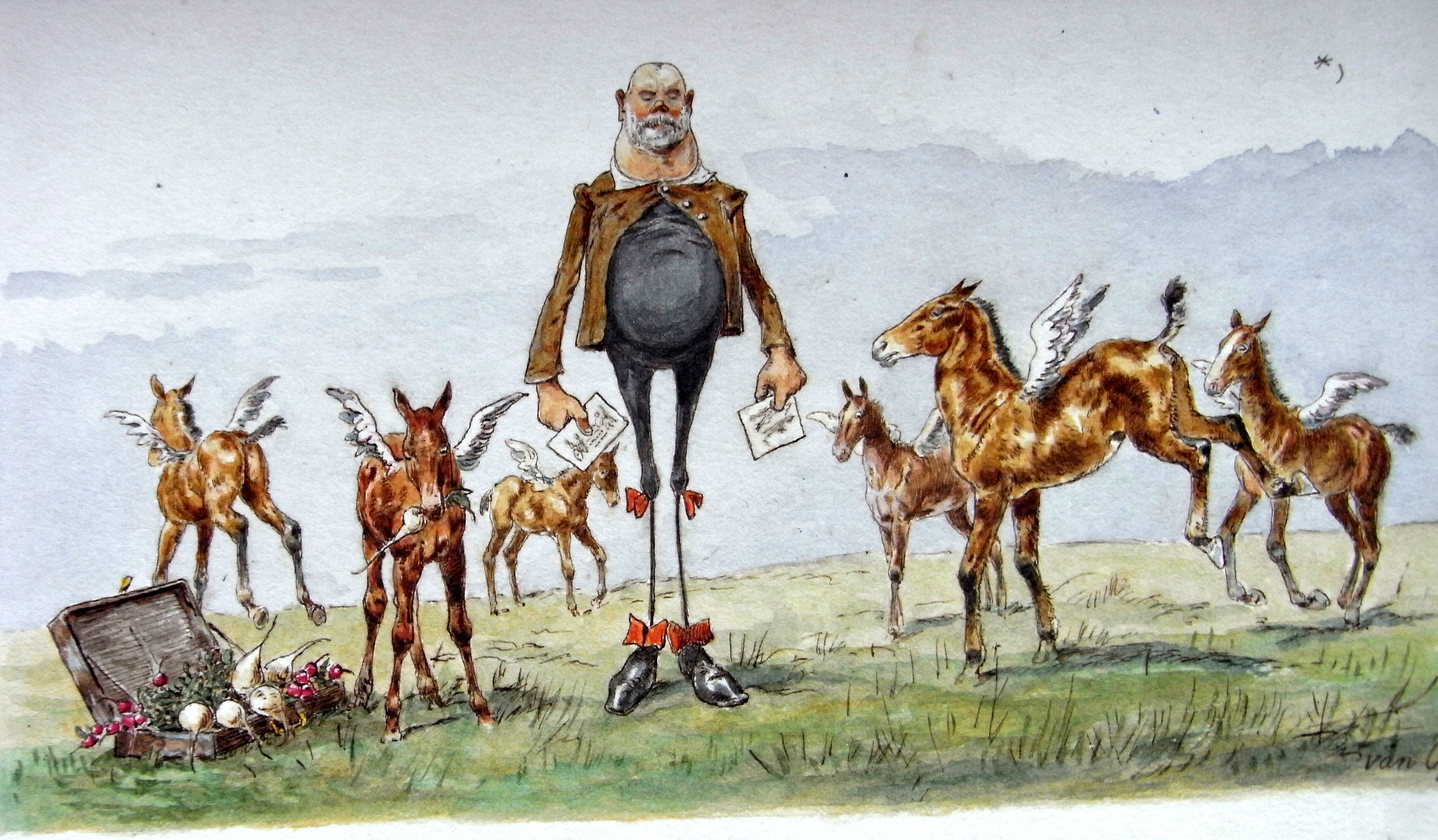 Ludiwg von Nagel in seinem Element umgeben von Pferden